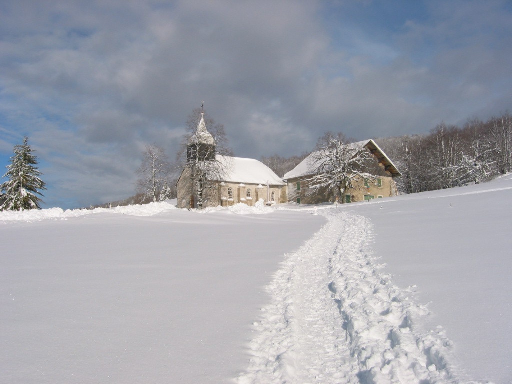 Le Plateau de Retord sous la neige, Ain, France La chapelle de Retord Photo prise le 7 février 2003 Aut : Jddmano